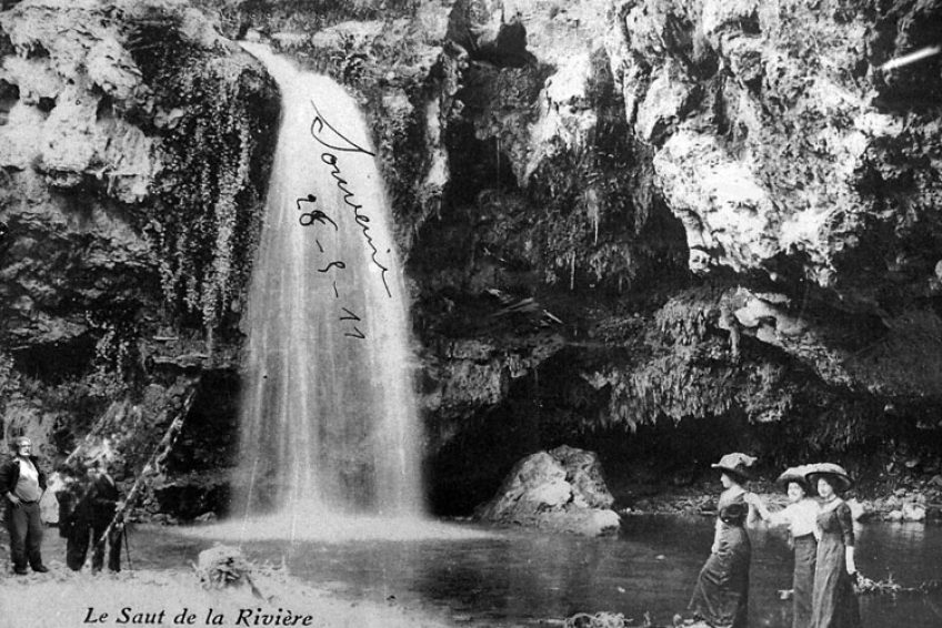 La cascade était au 19e siècle le refuge de la bourgeoisie marseillaise qui venait se rafraîchir à l’écart du centre-ville. Elle était sur la propriété du Château des Aygalades, qui fut démoli dans les années 1940 lors de la construction de l’autoroute A7.